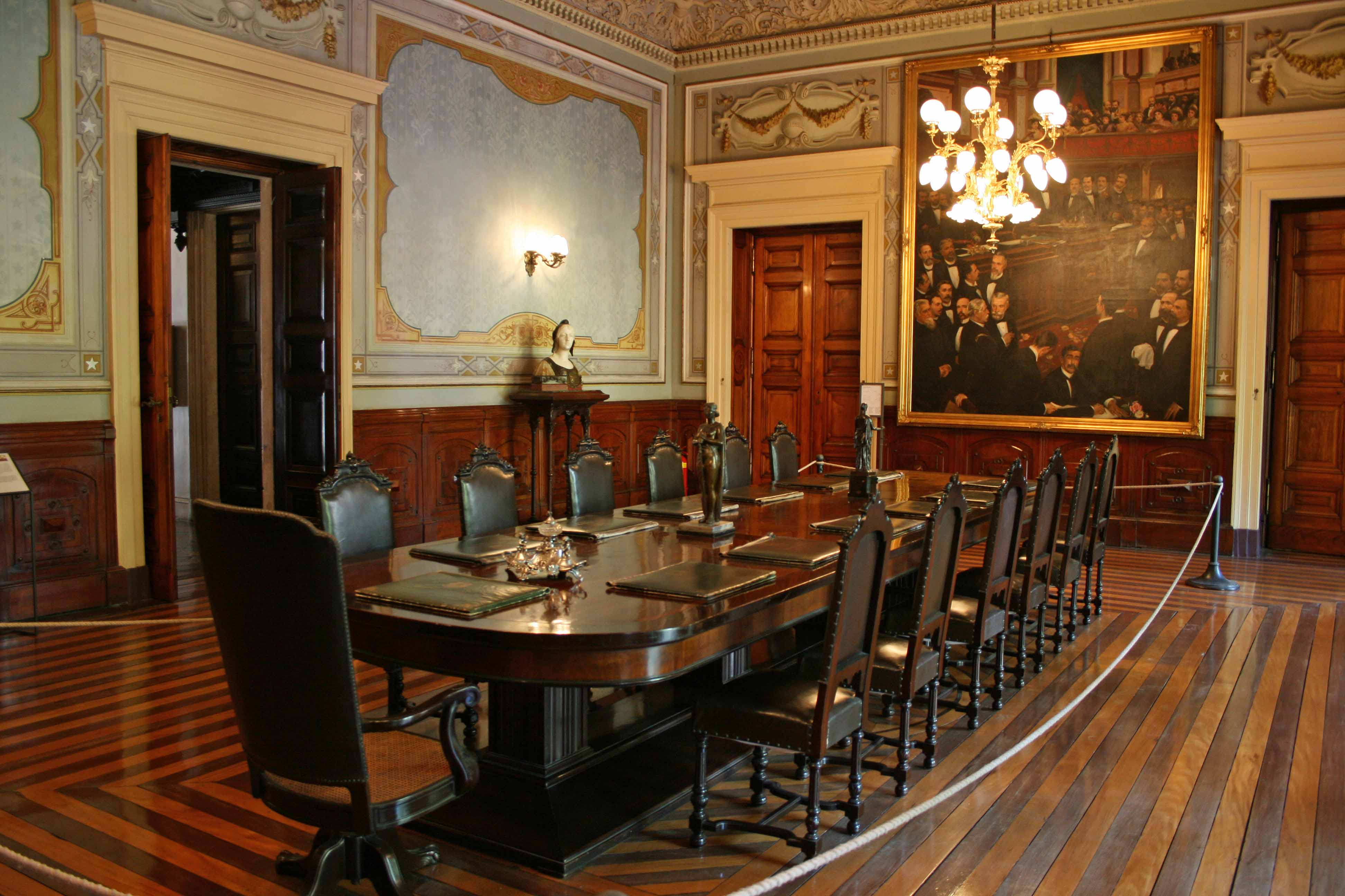 Palácio Nova Friburgo - Palácio do Catete - Museu da República - Salão Ministerial